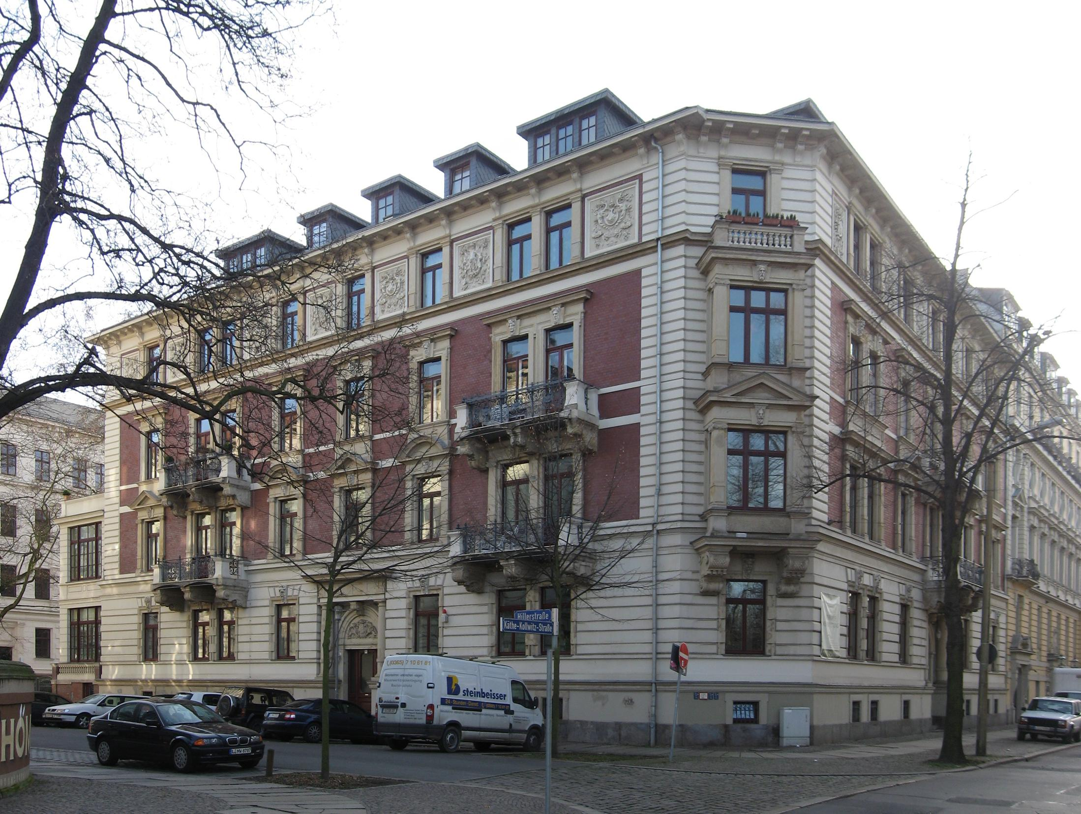 Leipzig, Wohnhaus Hillerstraße 9 Ecke Käthe-Kollwitz-Straße 69, erbaut 1885 von Max Pommer